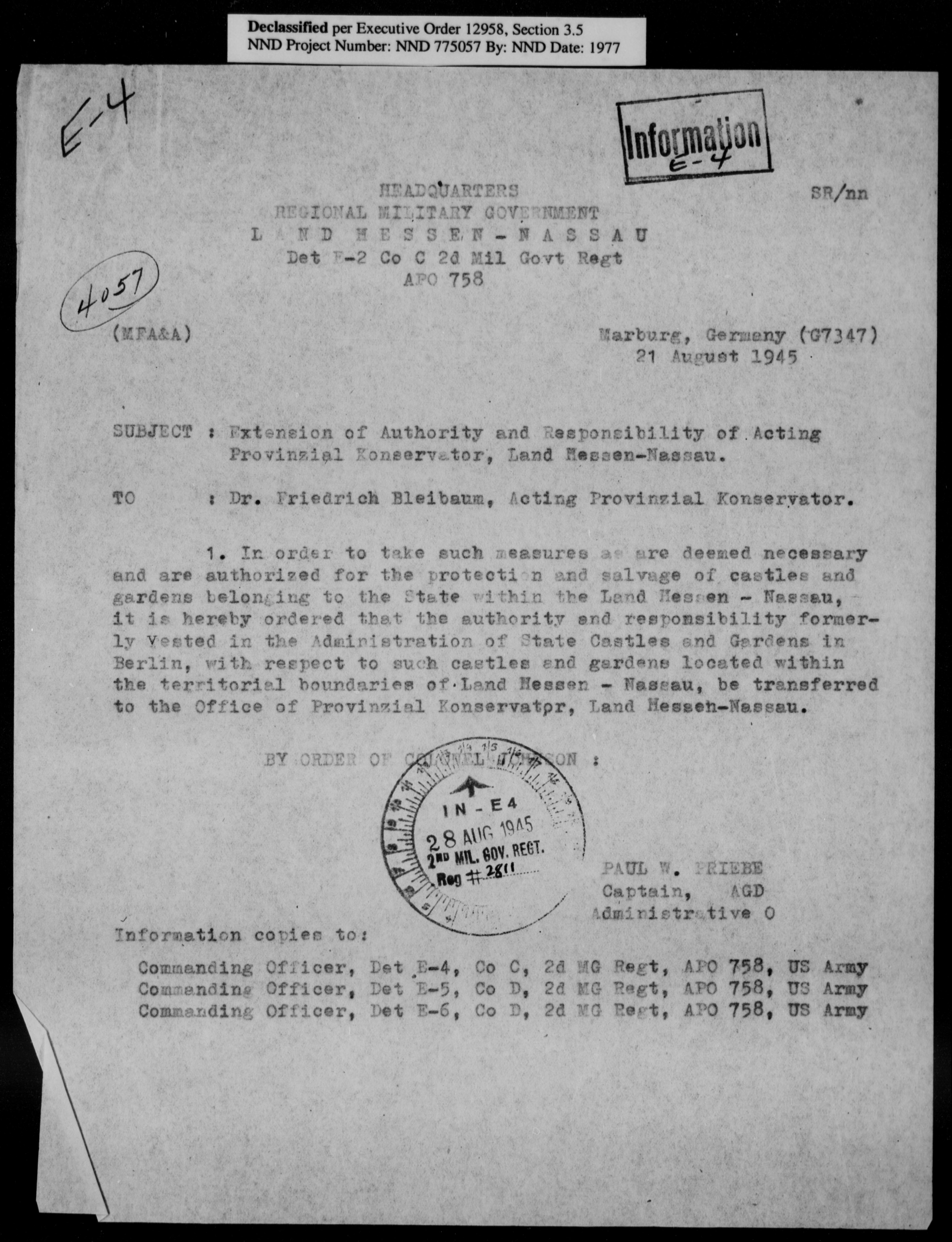 Übertragung der Verwaltung der Schlösser und Gärten in Hessen-Nassau an Friedrich Bleibaum im Jahr 1945.